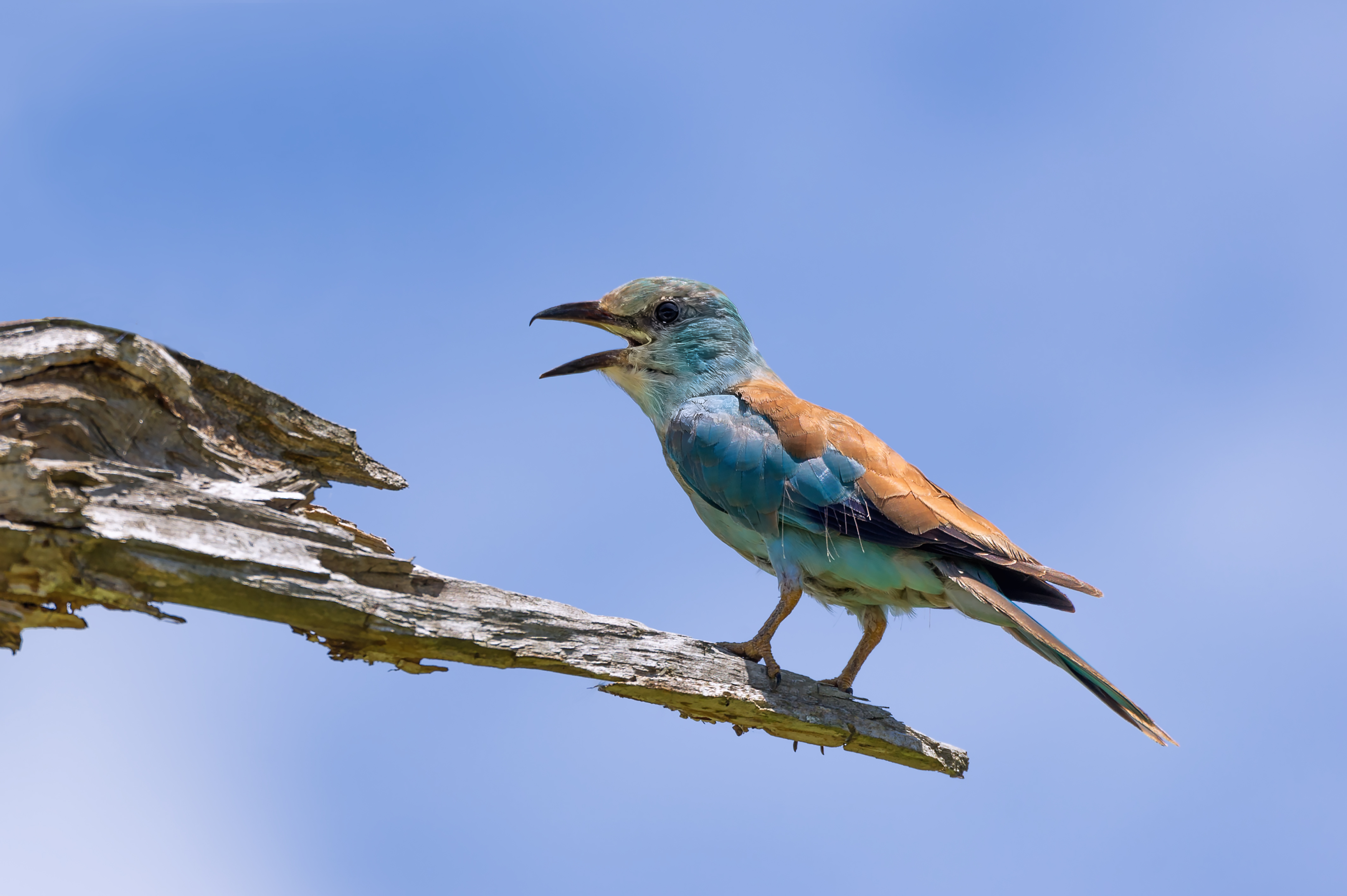 כחל אירופי עם מקור פתוח